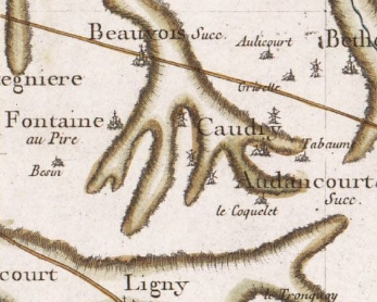 Caudry sur une carte de J. Seguin, ingénieur géographe du Roi (1758).